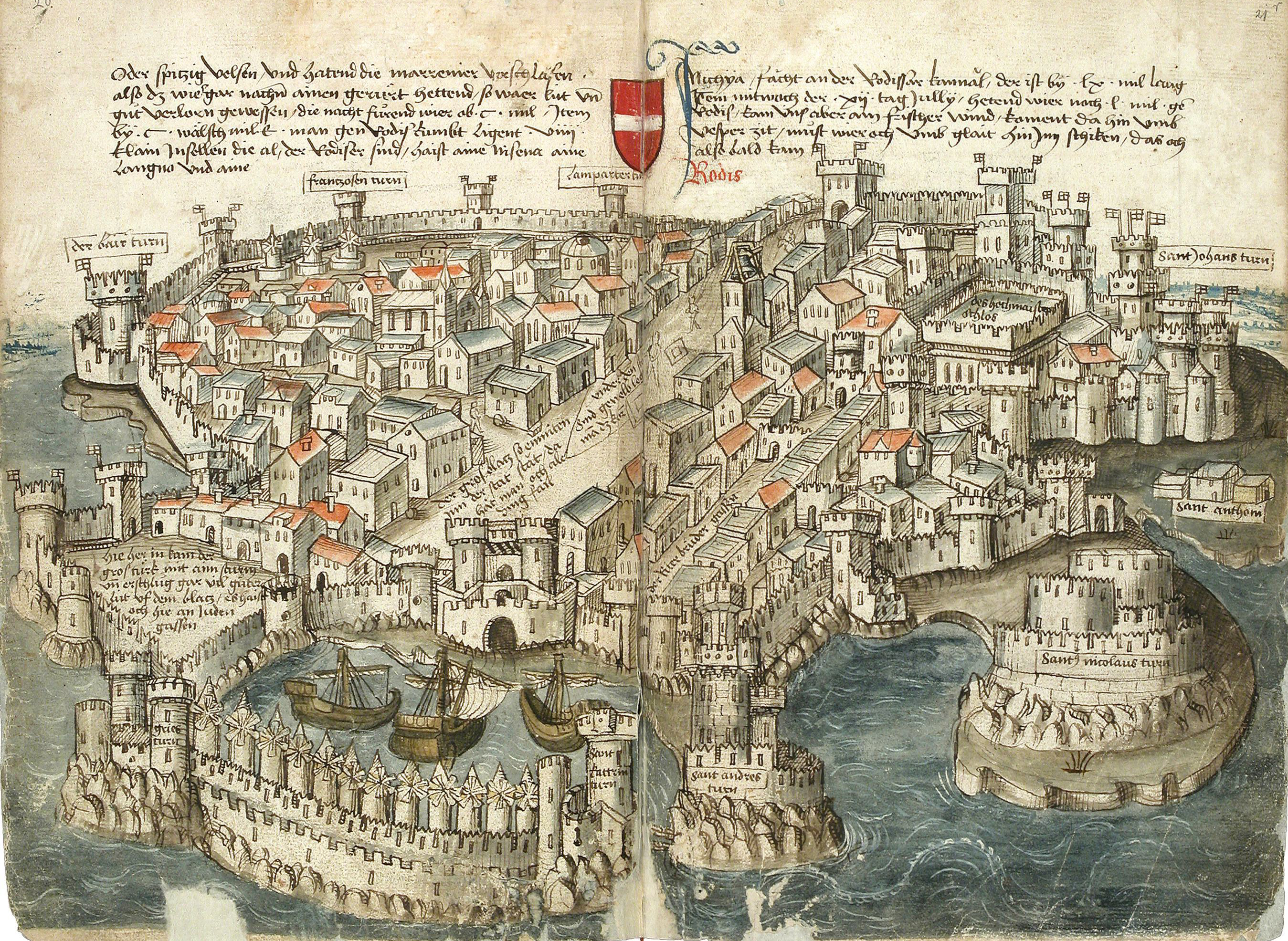 Doppelseite, aus Conrad Grünenberg: Beschreibung der Reise von Konstanz nach Jerusalem. Bodenseegebiet, um 1487. Badische Landesbibliothek Karlsruhe, Cod. St. Peter, pap. 32.